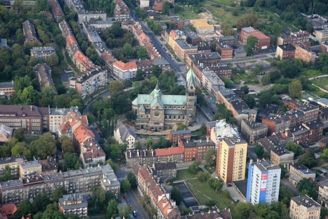 Bytom z lotu ptaka - kościół św. Jacka.